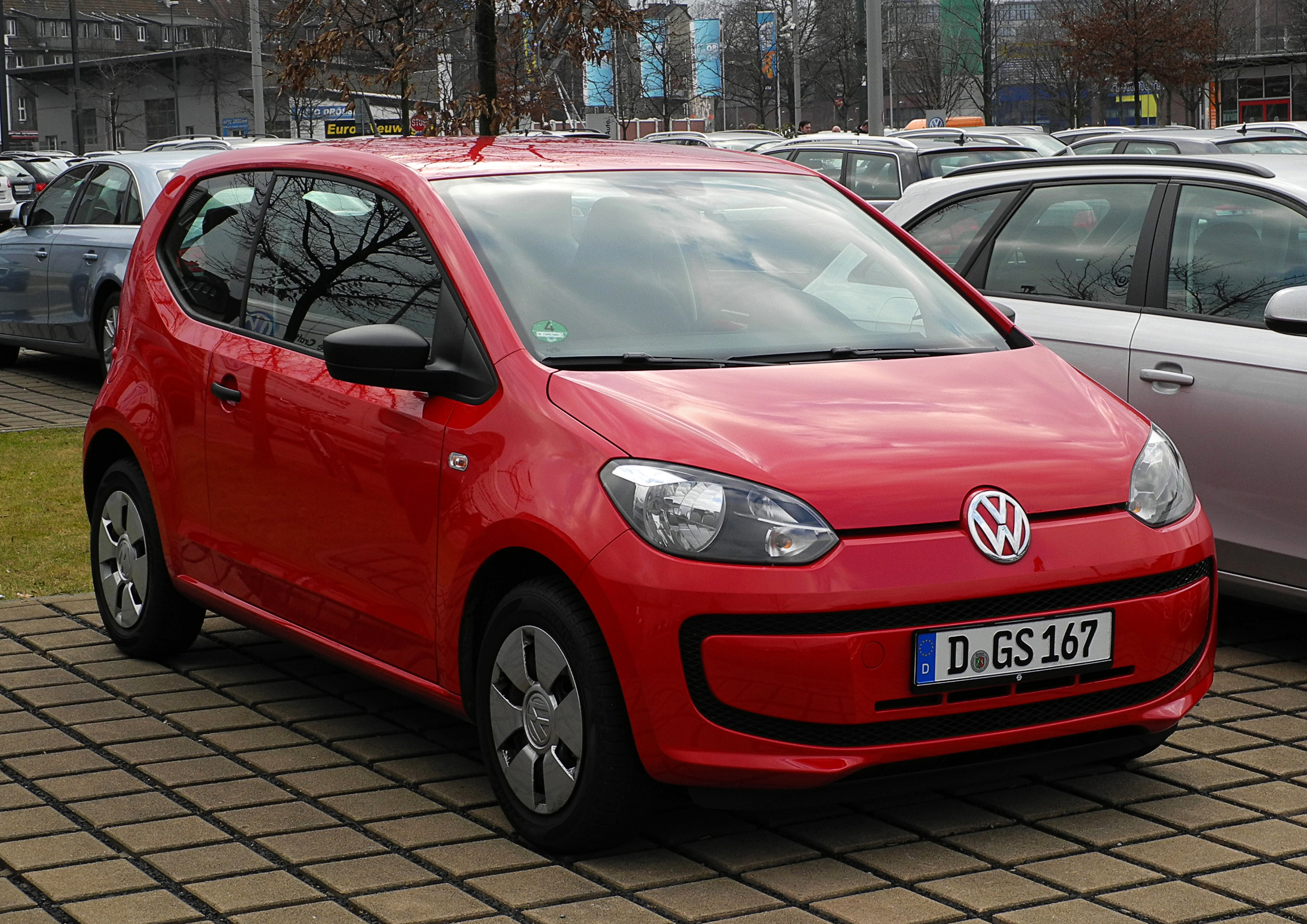 VW take up! 1.0